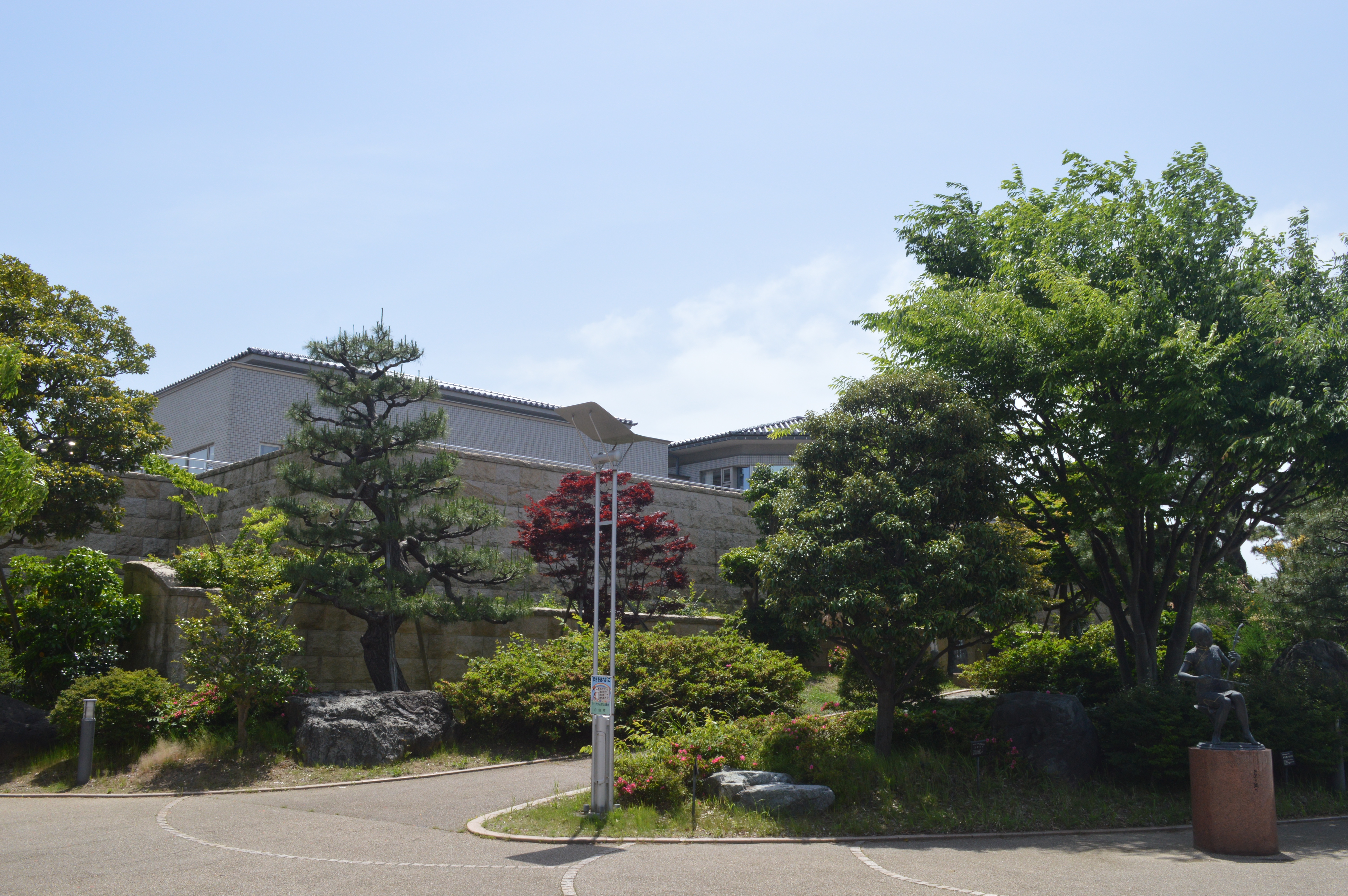 石川県白山市の白山市立松任図書館。